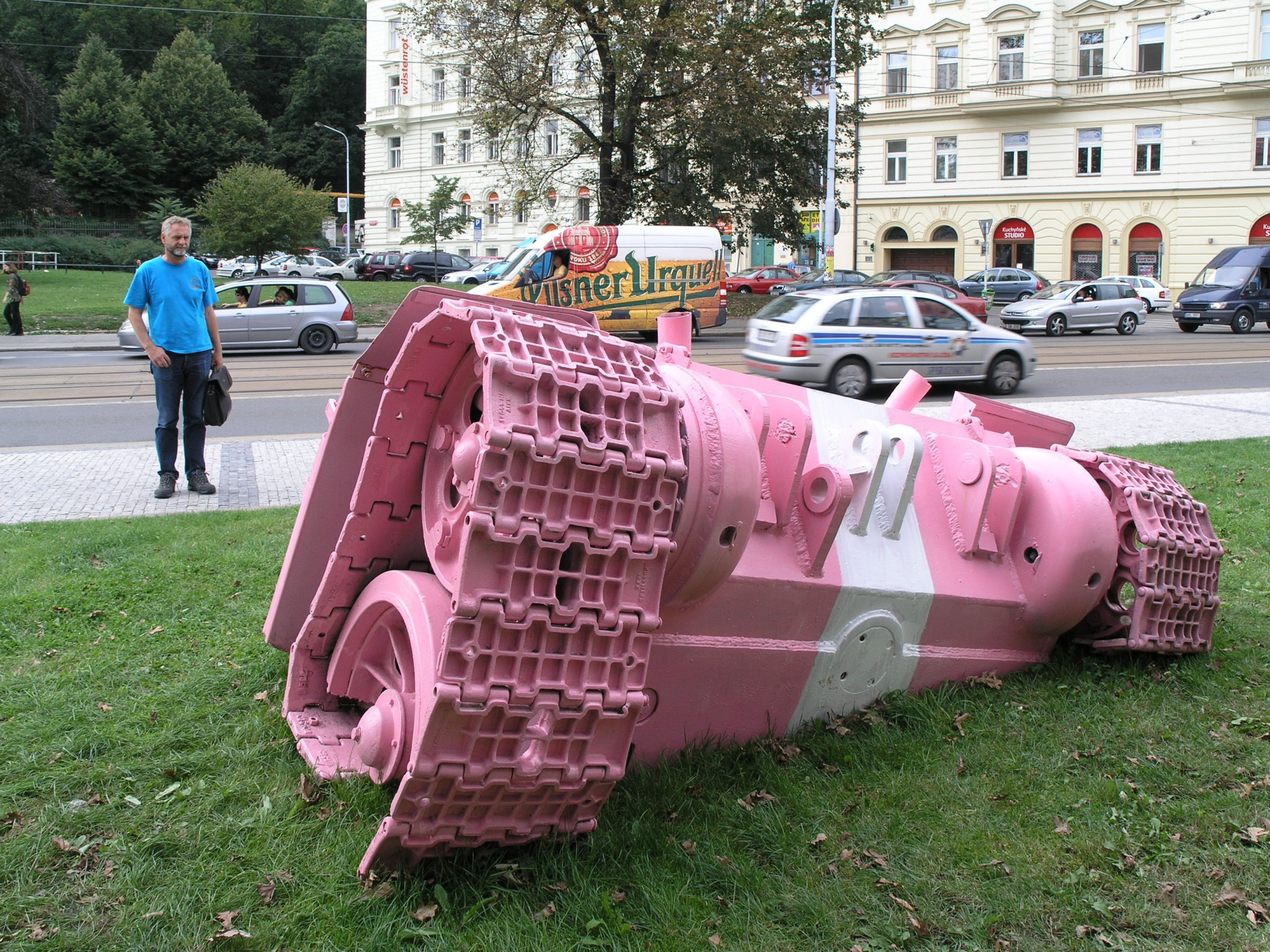 David Černý - torzo růžového tanku s bílým invazním pruhem, umístěné 21. srpna 2008 na náměstí Kinských v Praze na Smíchově